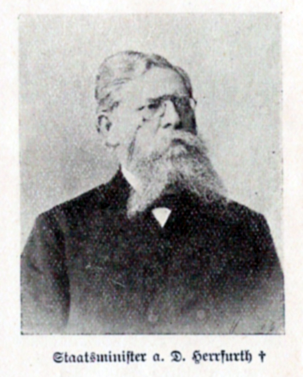 Portrait von Ernst Ludwig Herrfurth aus dem Jahrbuch der Berliner Morgenzeitung, Kalender 1901, p.209.